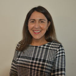 Abogada y Politica